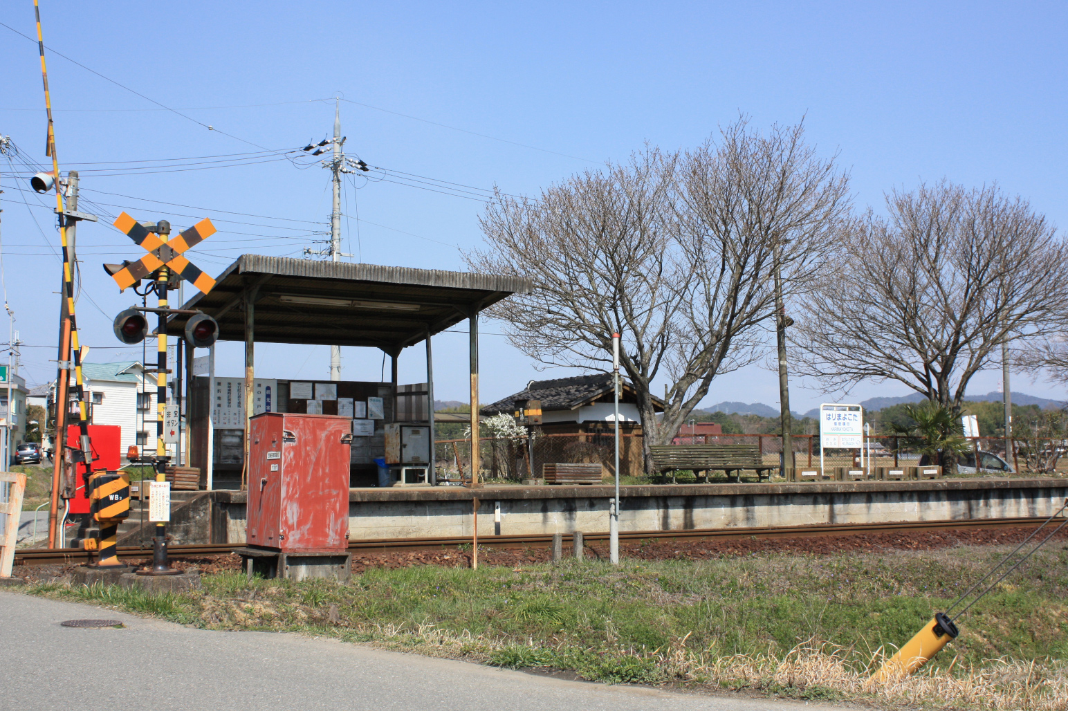 北条鉄道 播磨横田駅(Harima-Yokota Station)